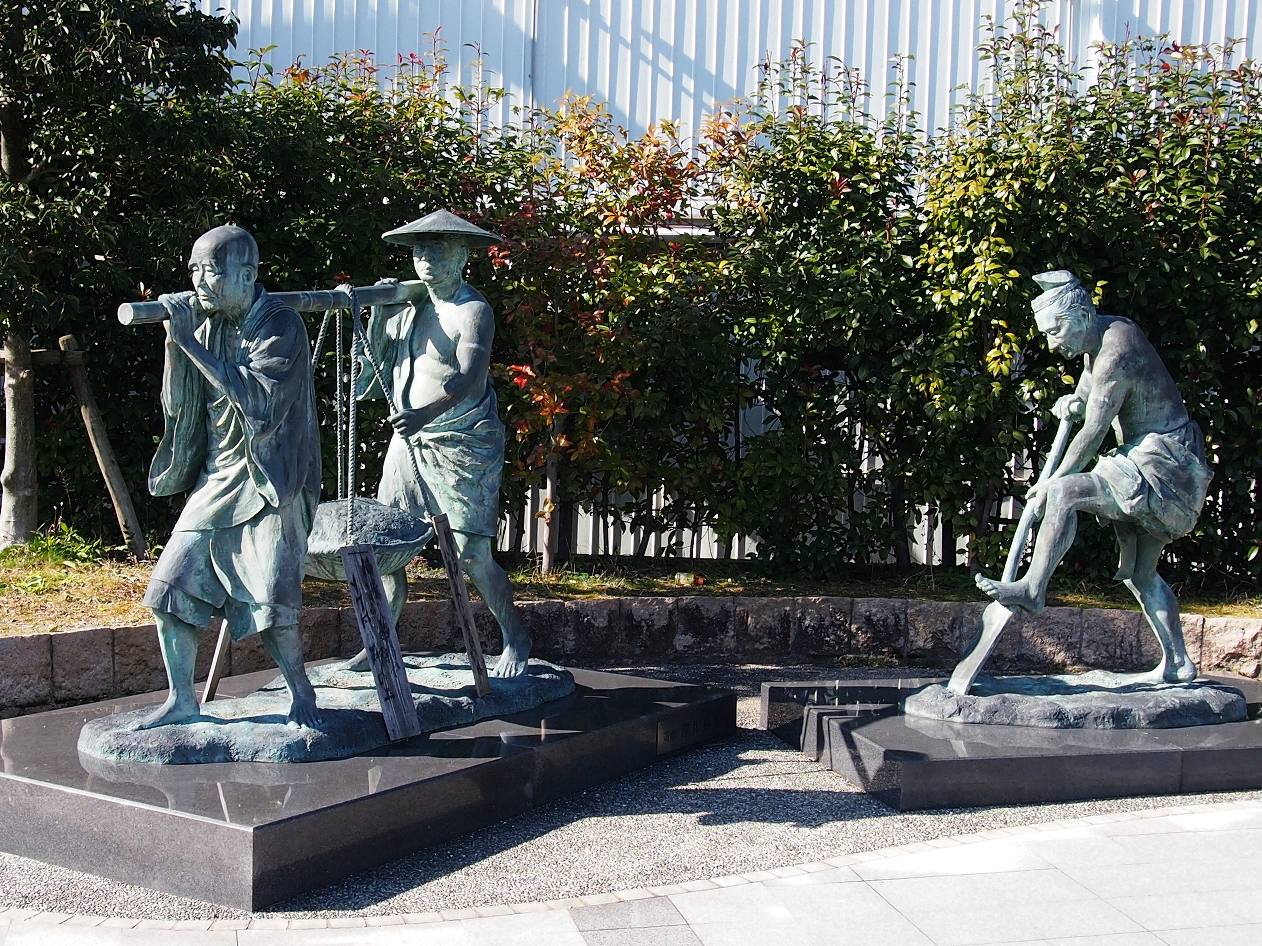 遊行の砂持ちの銅像。時宗の他阿真教が1301年に氣比神宮参道の整備をおこなったという故事にちなむ。